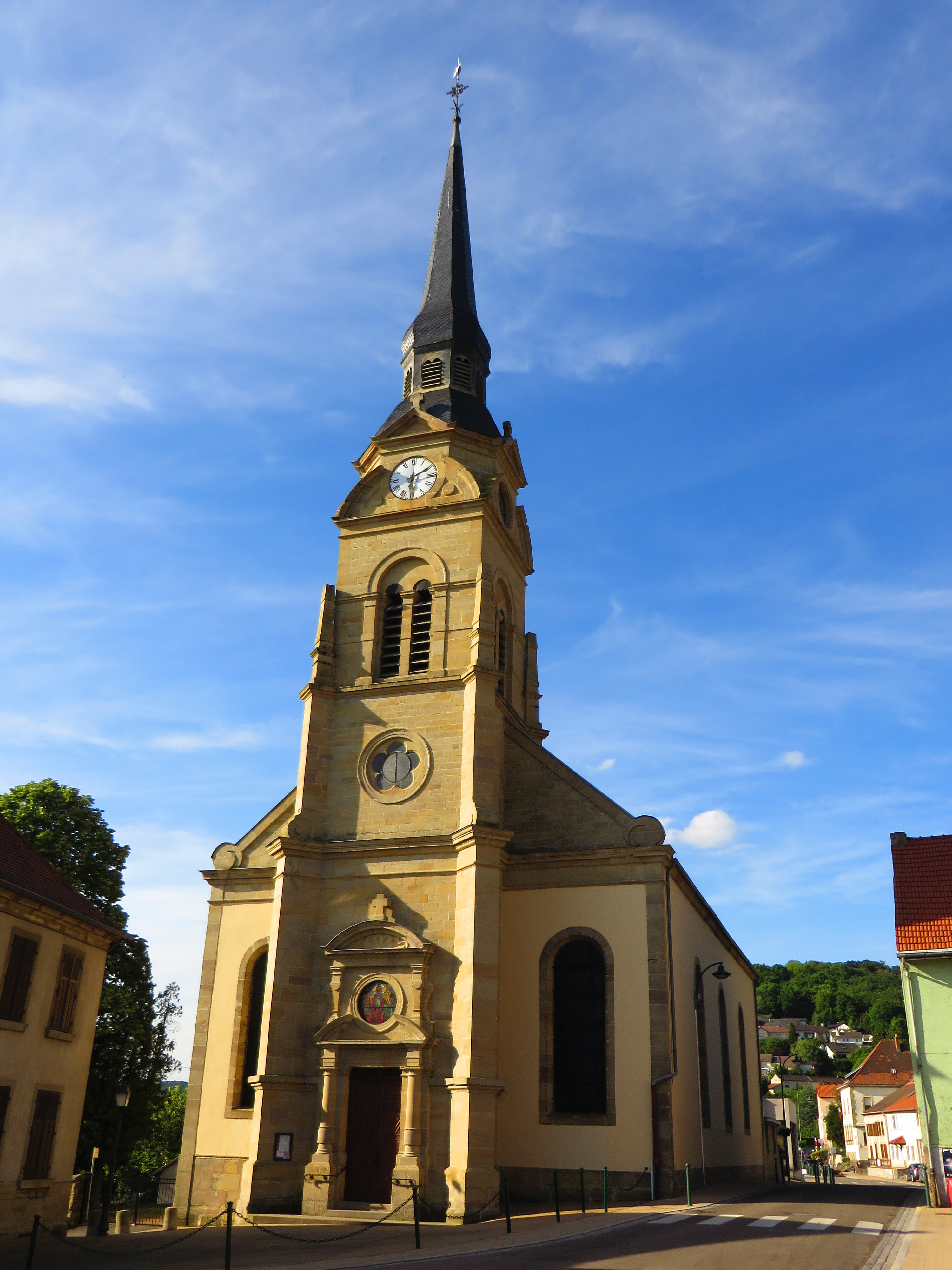 Cocheren eglise